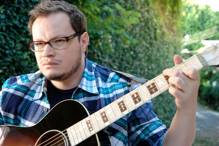 imagen tomada en la grabacion del video de "Eras tu" primer sencillo del segundo trabajo discografico de leonel garcia.